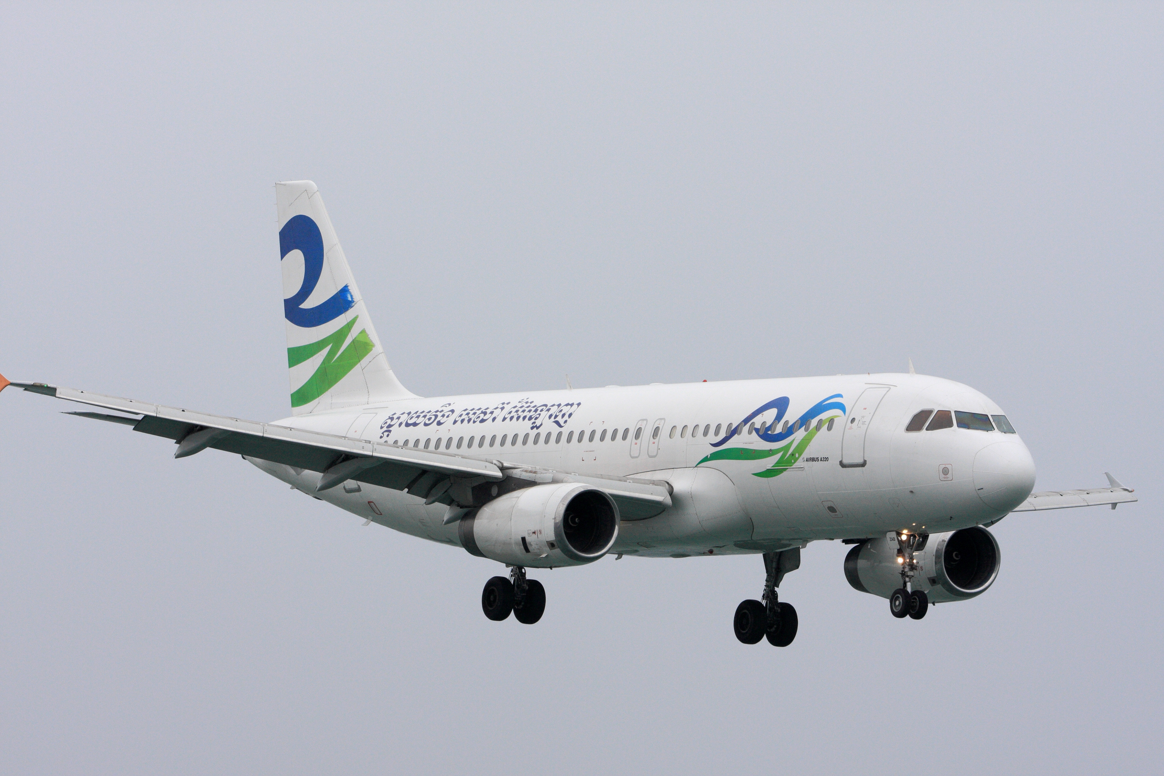 新潟空港で撮影された、スカイウィングス・アジア・エアラインズのAirbus A320-200型機